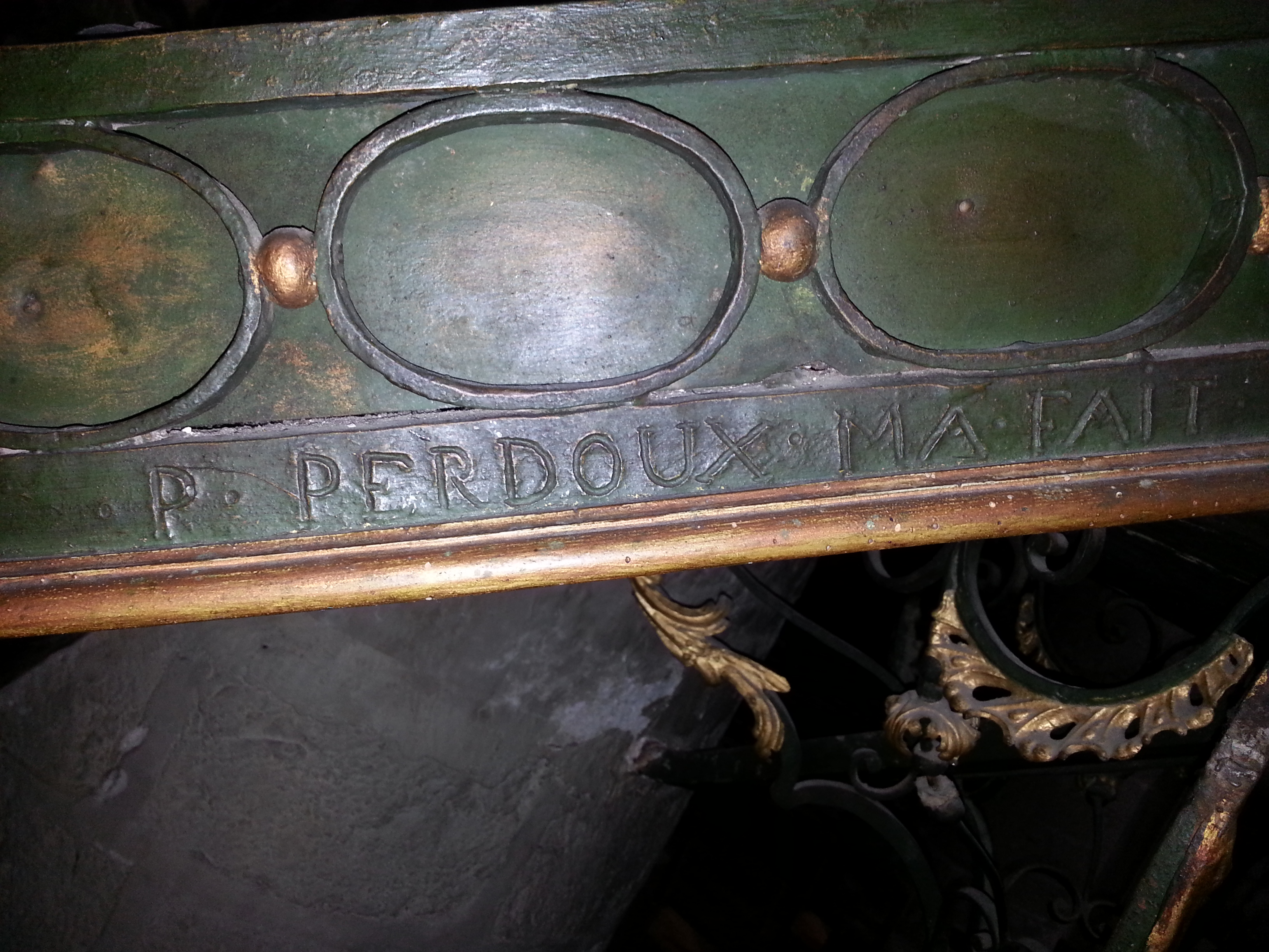 Inscription "P Perdoux m'a fait" sur la structure de l'escalier de la chaire de l'église Saint-Étienne de Jargeau dans le Loiret. Perdoux était le ferronnier qui a fabriqué la chaire.